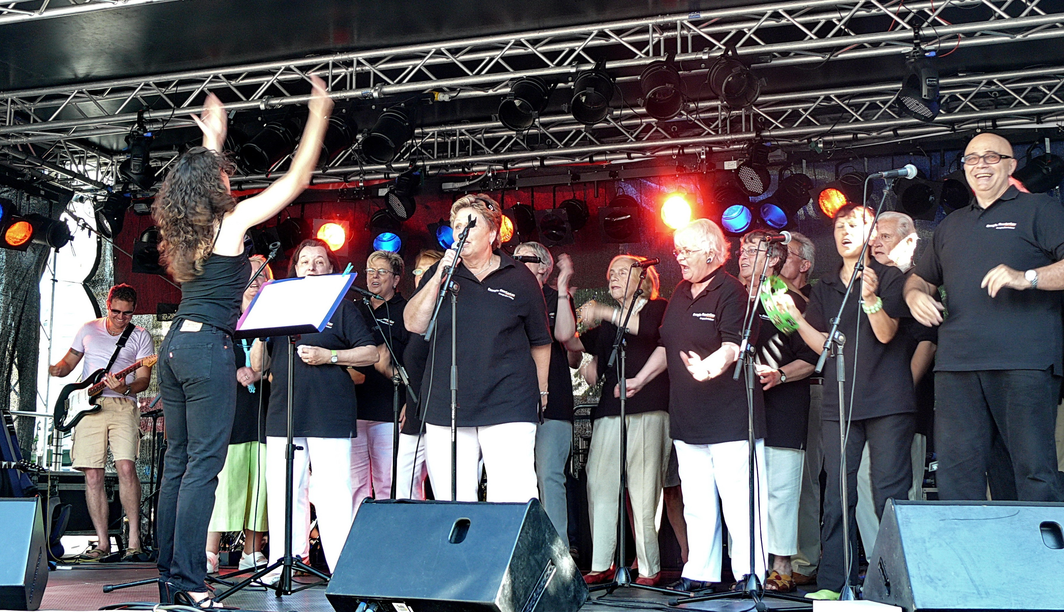 Heartchor Saarbrücken